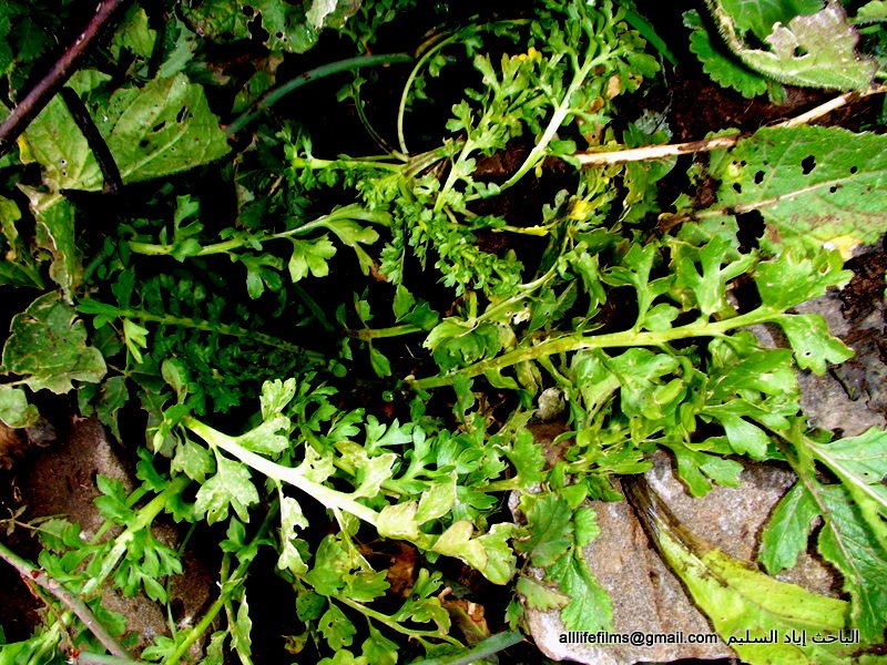 نباتات برّية سورية تؤكل